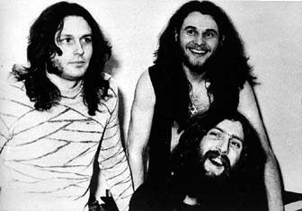 Le Orme nel 1973, da Ciao 2001 n.17, 1973, Anno V